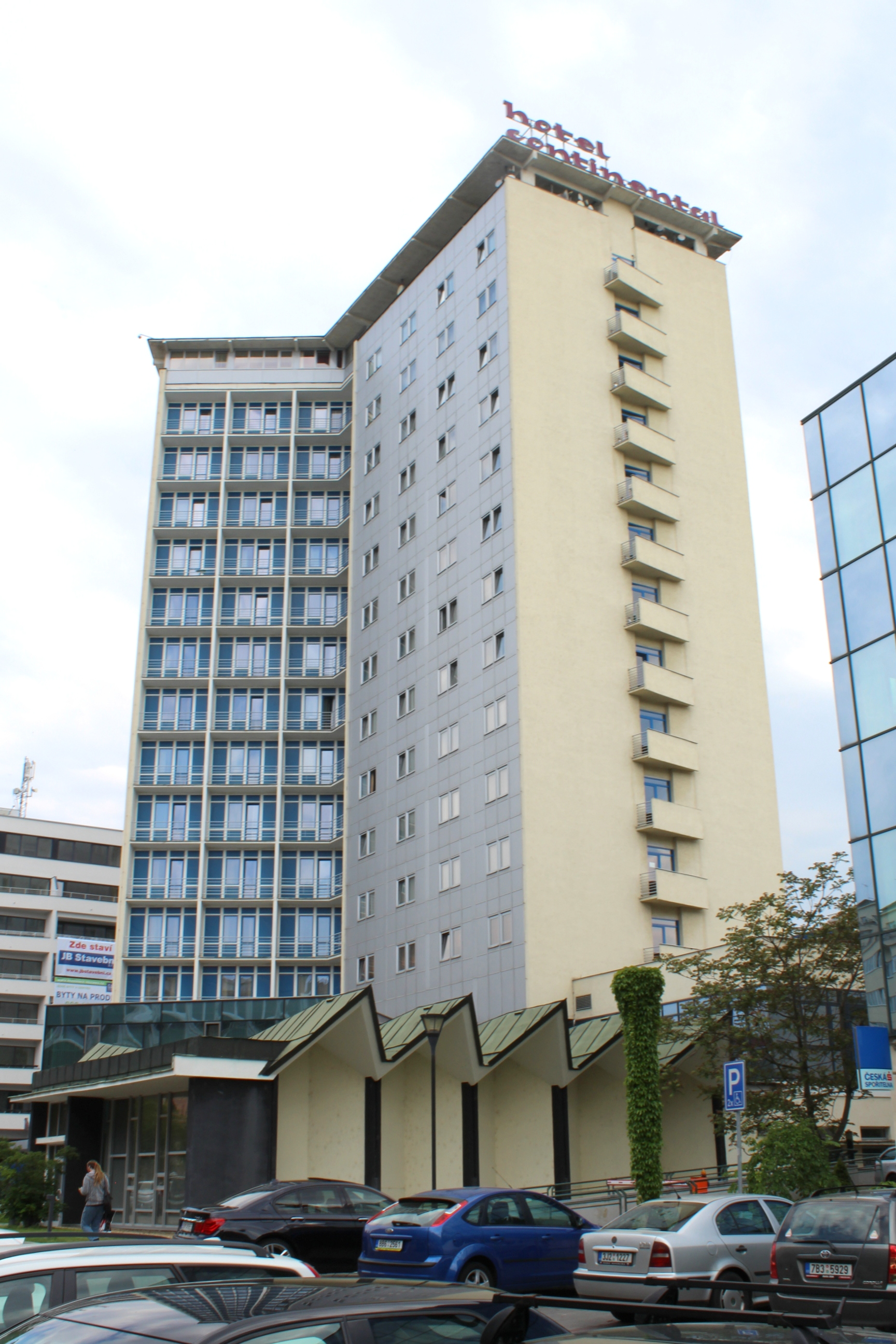 Hotel Continental (Brno)